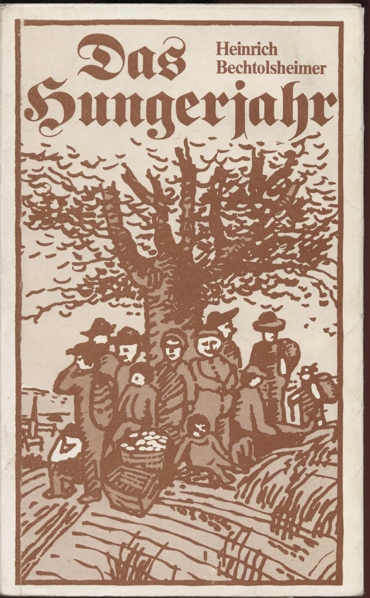 Buchcover Heinrich Bechtolsheimer